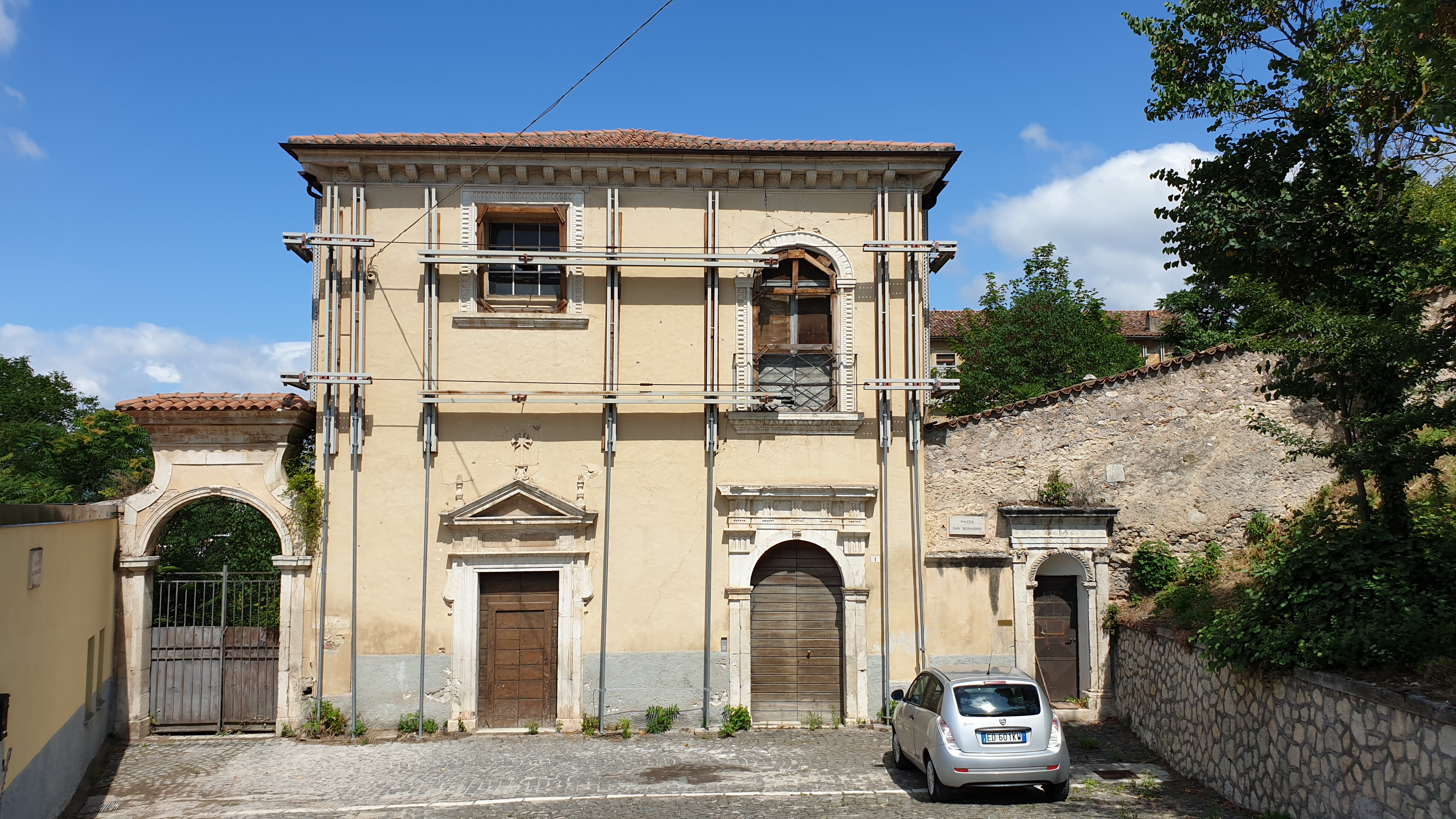 L'Aquila: Chiesa di San Bernardo